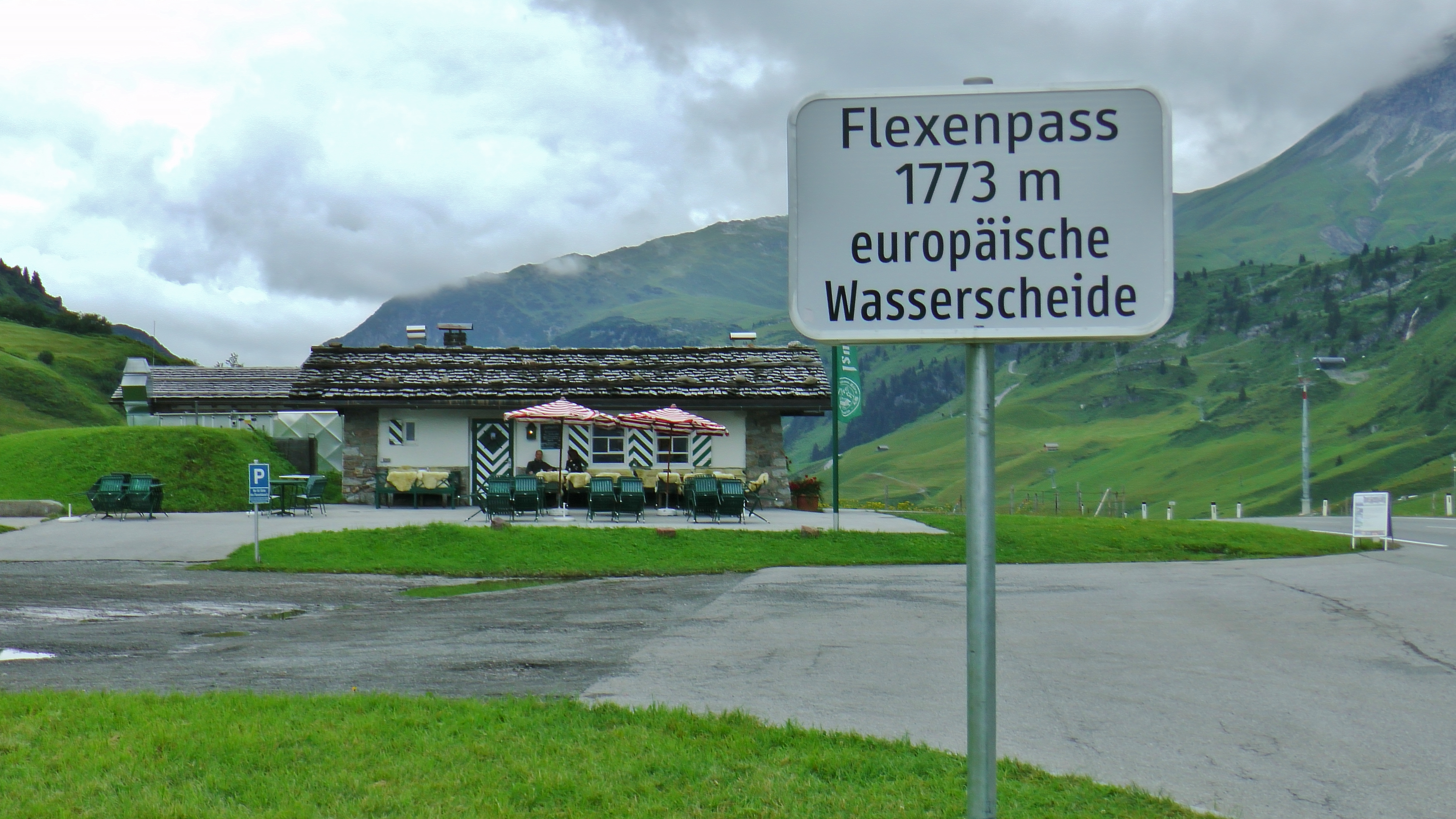 Passhöhe des Flexenpasses mit Flexenstübl, Blickrichtung Nord.